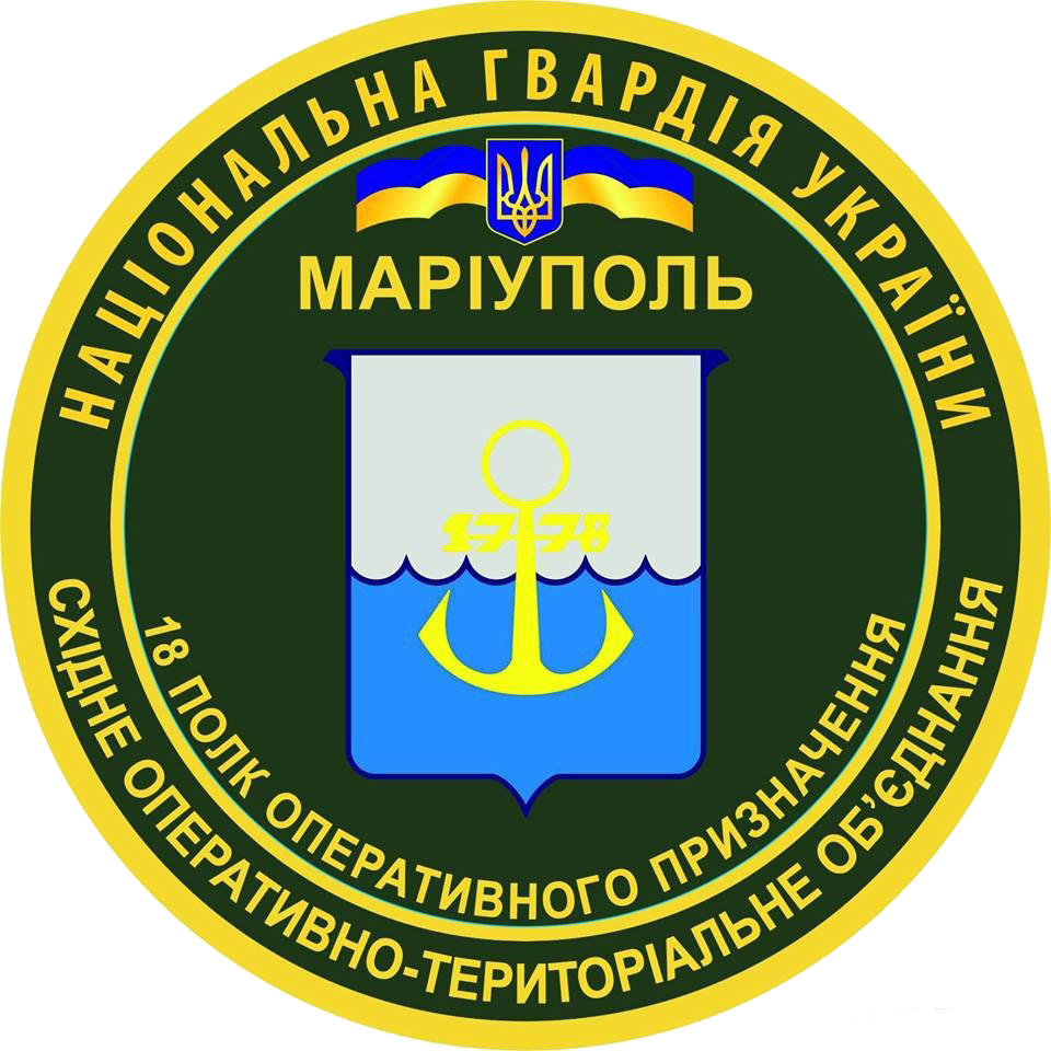 Нарукавний знак, 18 окремий полк оперативного призначення, Національна гвардія України